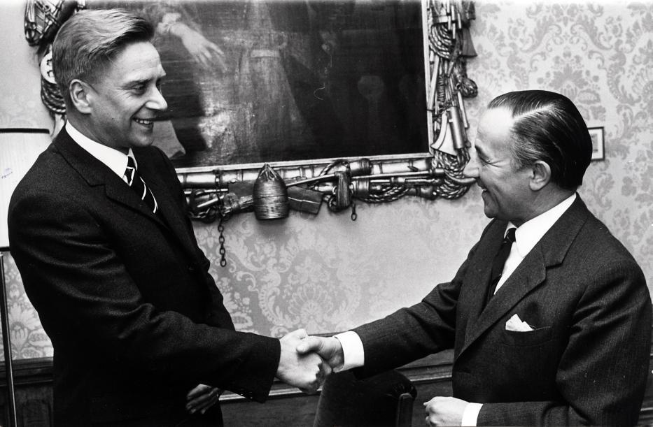 G.H. Veringa feliciteert minister de Jong. Den Haag, Nederland, april 1967.